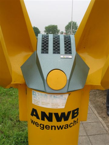 Praatpaal